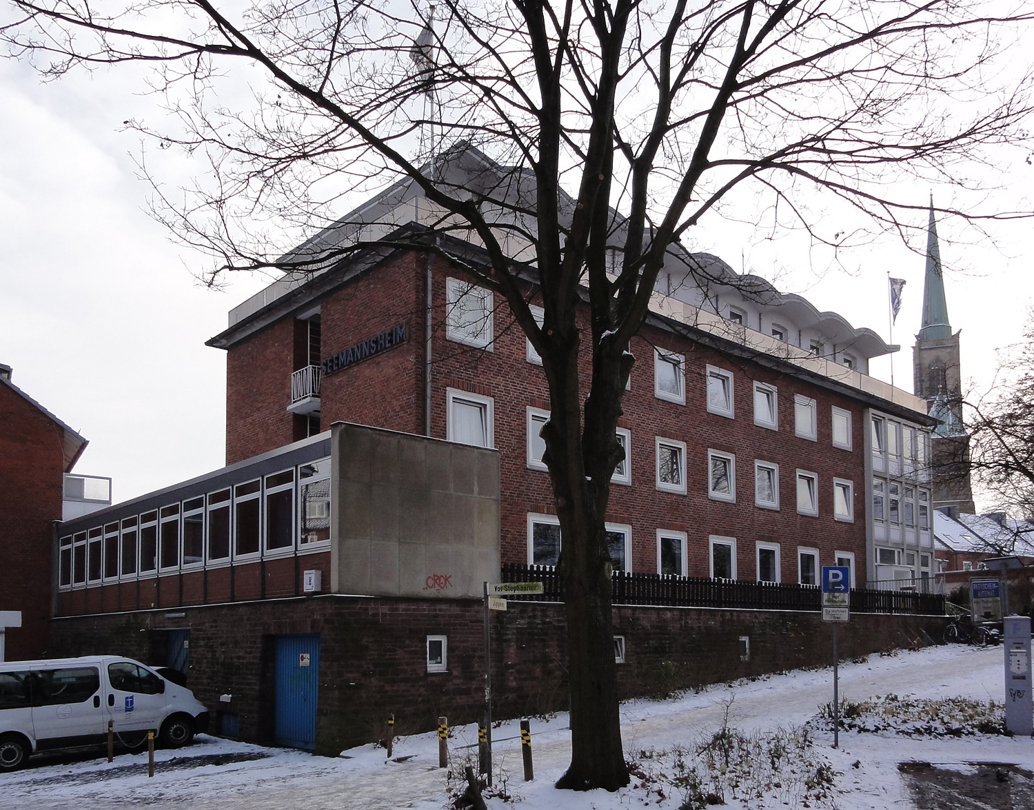 Bremer Seemannsheim an der Stephani-Kirche in Bremen, Jippen 1. Architekten: R. Richter & W. Kläner. Errichtet: 1955/56 mit 90 Betten, bis 1992 auf 34 Zimmer mit 43 Betten verkleinert und modernisiert.